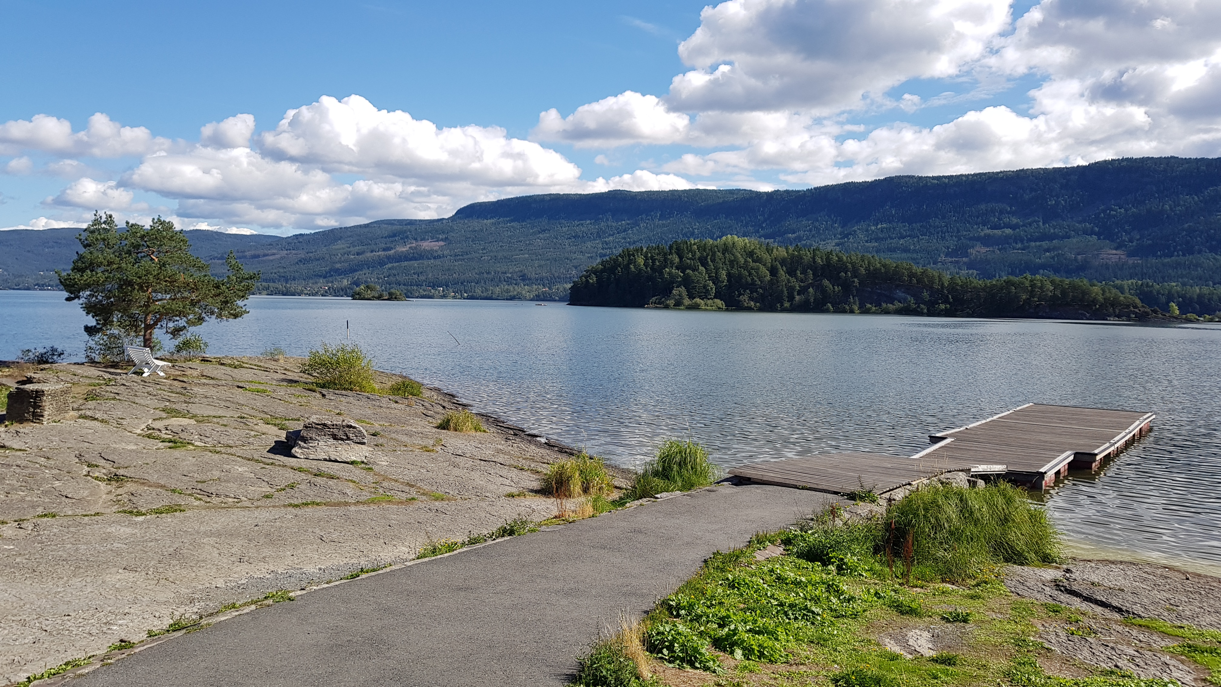 Garntangen er fysisk en tange som stikker ut i Steinsfjorden. I bakgrunnen ligger Braksøya, som er naturreservat.